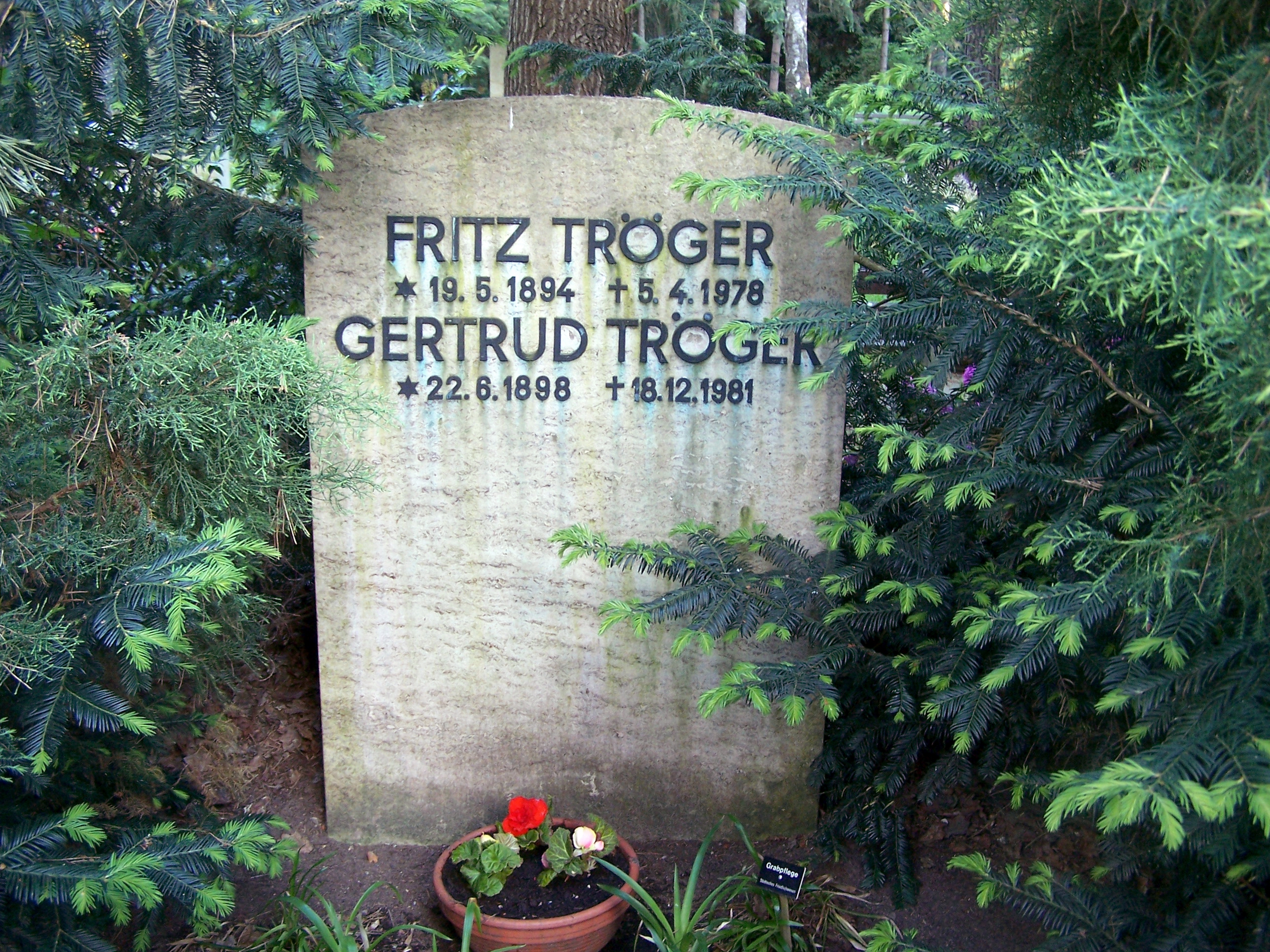 Grab des Malers Fritz Tröger auf dem Heidefriedhof in Dresden